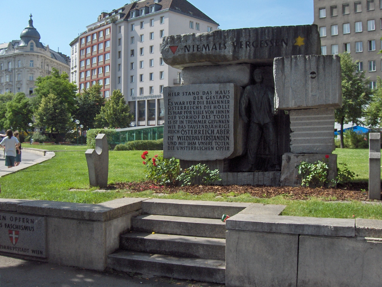 Gestapo monument; Vienna, Austria